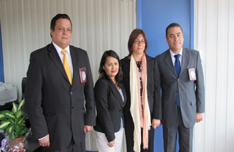 "Una serie de visitas protocolares ha estado recibiendo la gobernadora de la provincia Cardenal Caro, Teresa Núñez Cornejo, luego de asumir el cargo el pasado miércoles 12 de marzo. La nueva autoridad provincial, recibió el día jueves a las jefaturas de la PDI en la región, Jorge Reyes Miño, Prefecto (S) y a Iván Luis Vallejos González, Subprefecto San Fernando. Al diputado del distrito 35 Sergio Espejo y al director regional del Instituto Profesional IPG sede Rancagua, Luis Cabrera, entidad de educación técnico profesional que imparte diversas carreras técnicas en la provincia Cardenal Caro. En la oportunidad, los personeros mencionados manifestaron a la autoridad provincial sus buenos deseos en su gestión y su máxima colaboración en lograr los objetivos que se han fijado para la provincia Cardenal Caro." ([1])